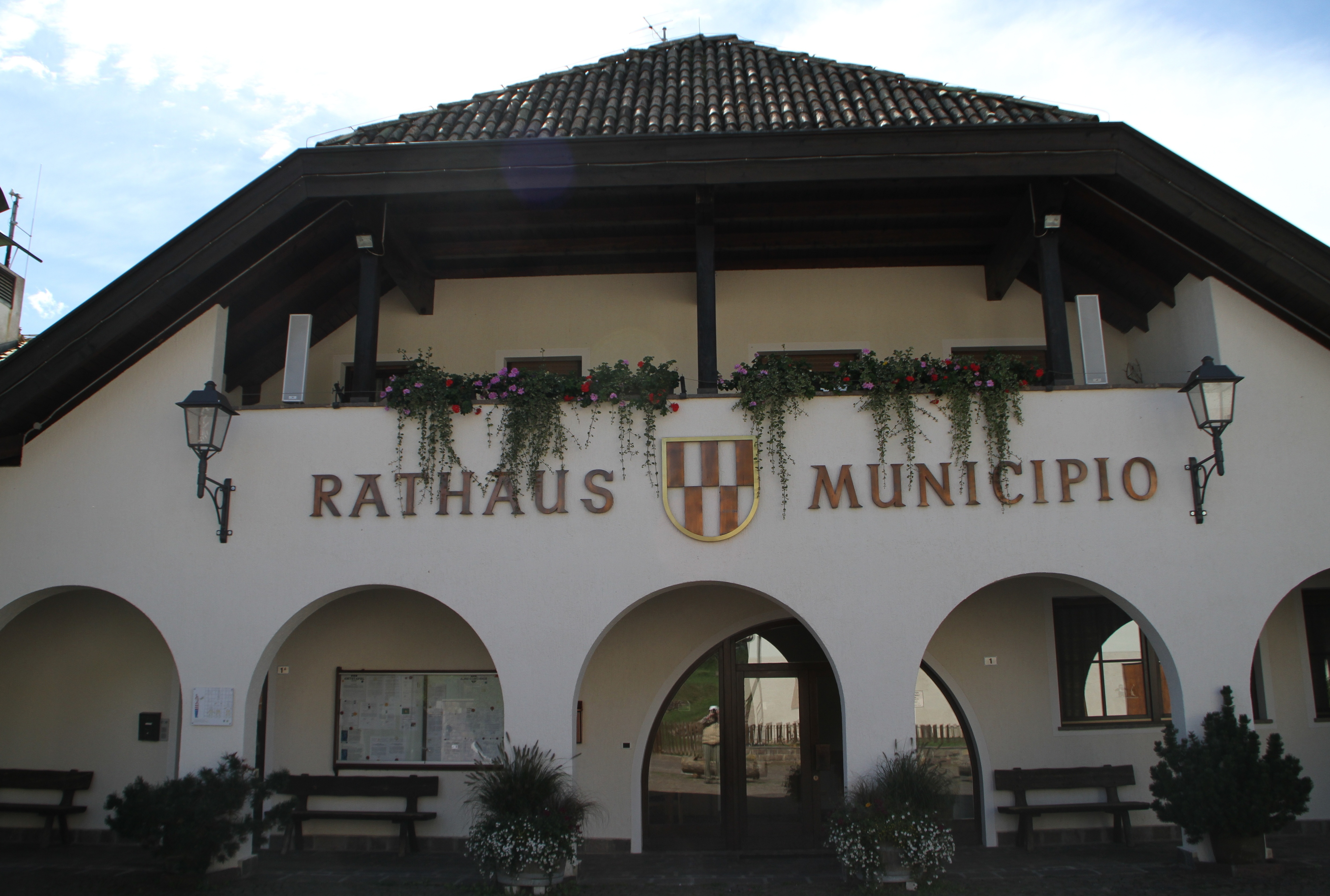 Rathaus von Altrei